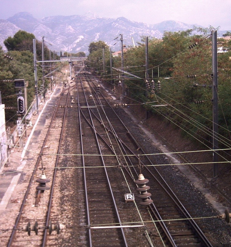 A la sortie est de la gare d'Aubagne, l'ancienne voie vers Fuveau (à gauche) côtoie les deux voies en service vers Toulon.